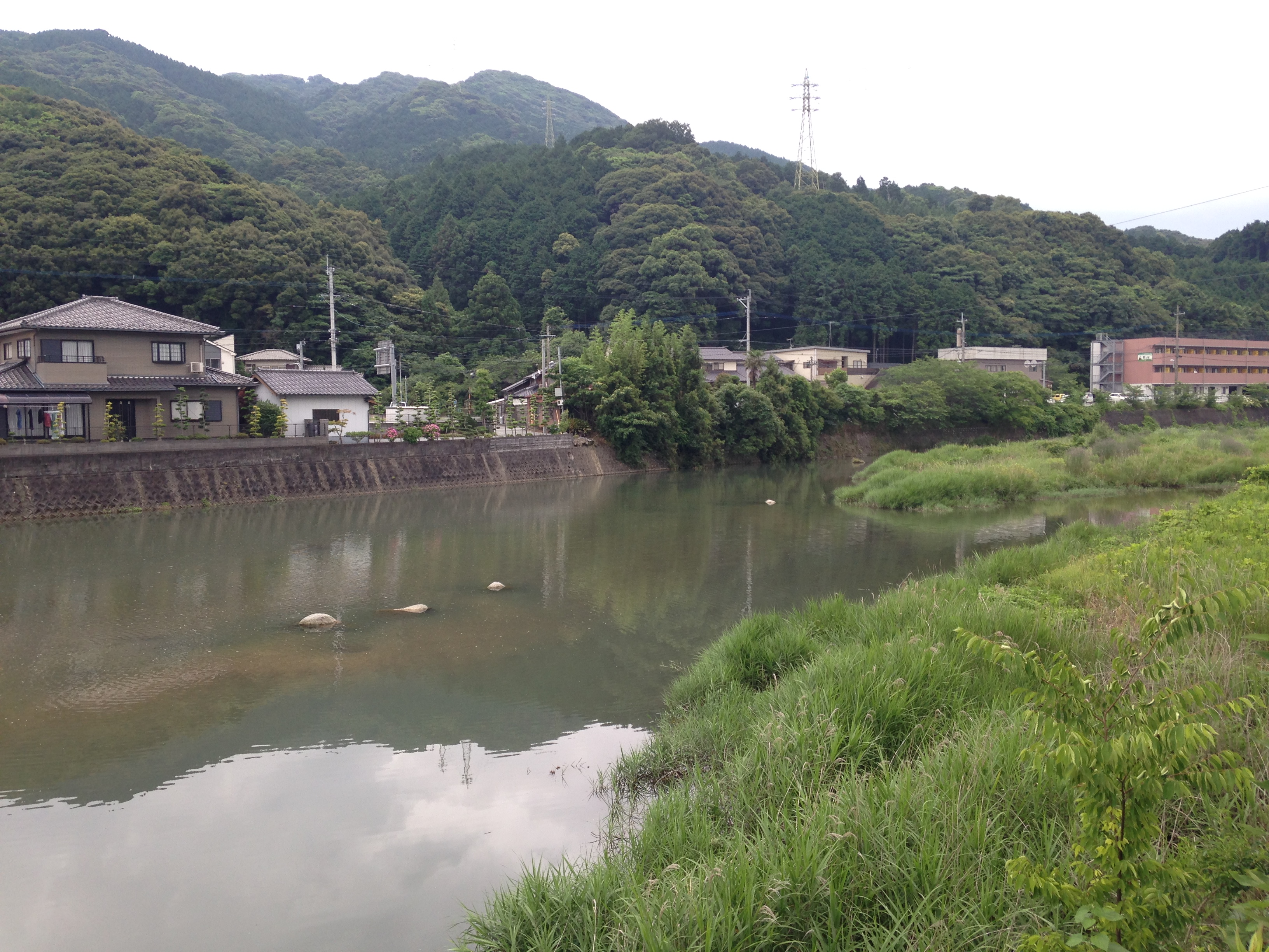 大井手橋の東側より望む室見川(上流側)